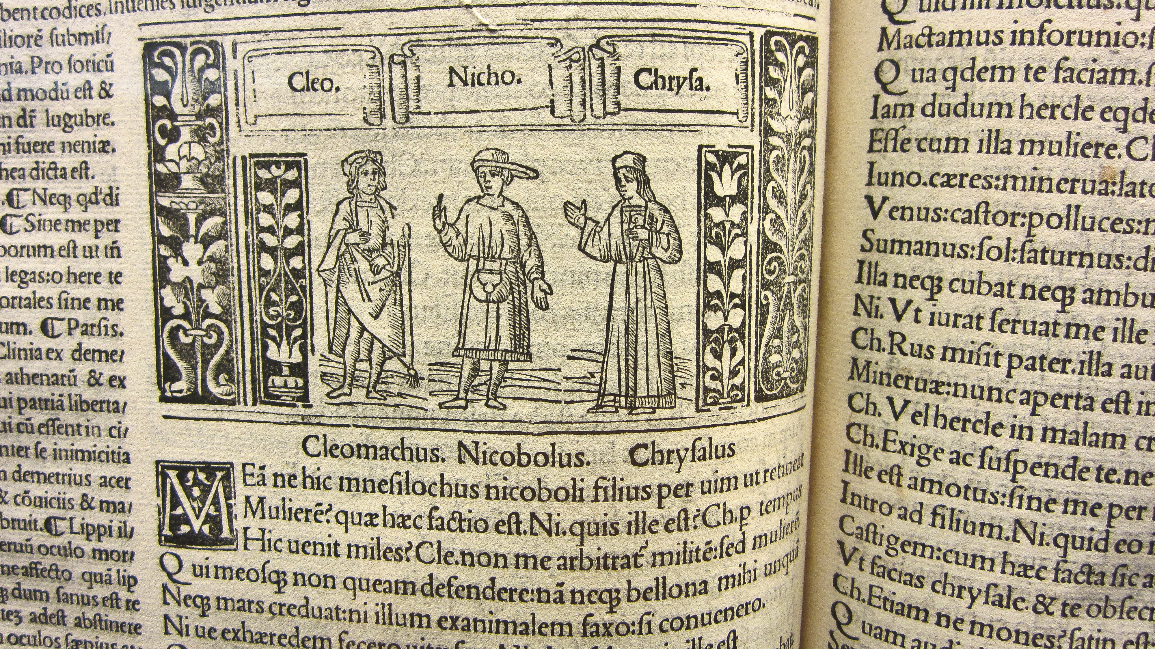 Plauto, Tito Maccio Ex emendationibus, ad que commentariis Bernardi Saraceni, Ionannis Petri Vallae Plauti Comoediae XX recens singulari diligentia formulis excusae...; ad haec index in primo statim operis uestibulo occurret... Impressum Venetiis: per lazarum Soardum, 1511 Comediógrafo latino del siglo III-II a.C. Biblioteca de Santa Cruz. Valladolid.